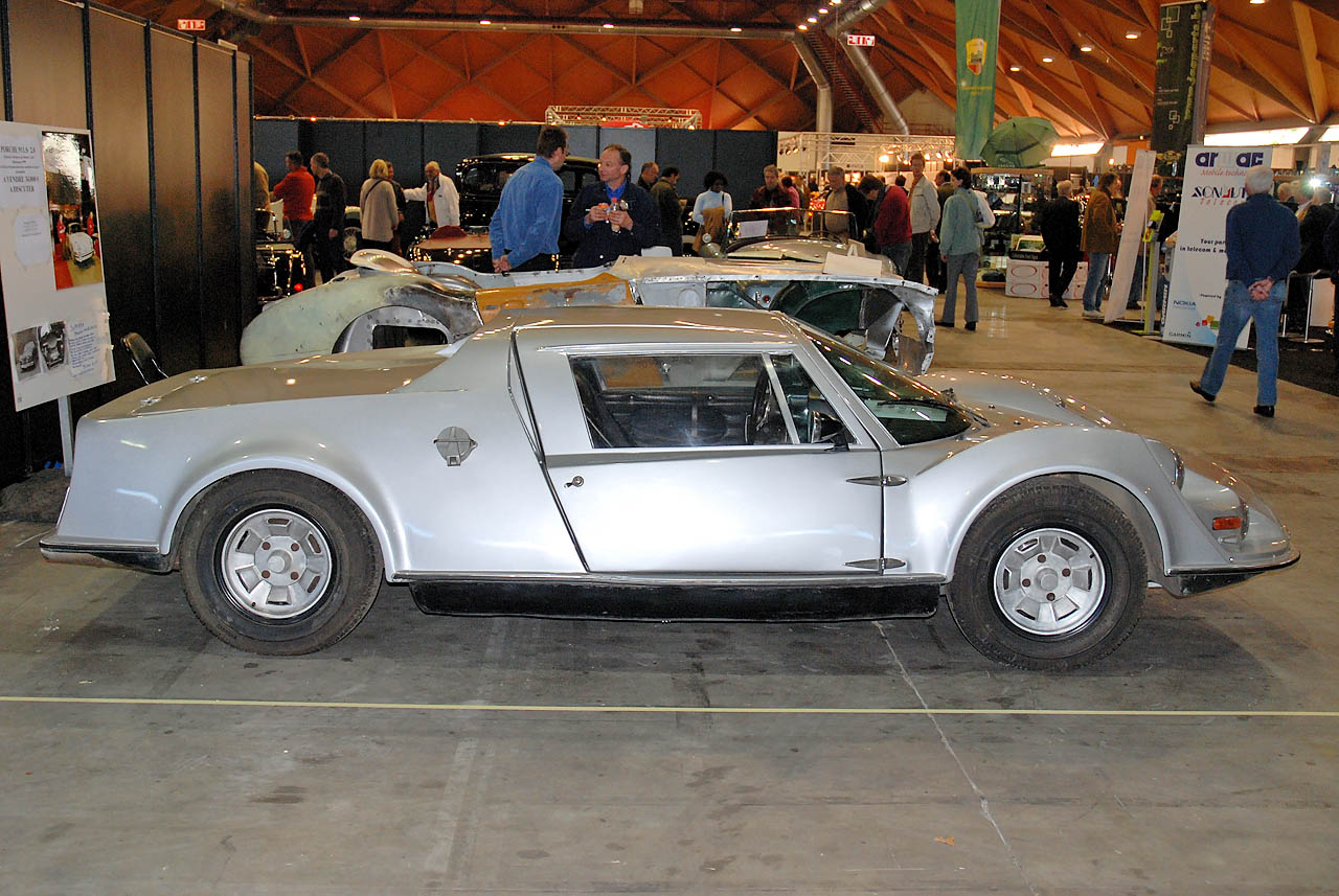 mid-engined sportscar, made in Belgium by Application Polyester Armé de Liége; left front-side view